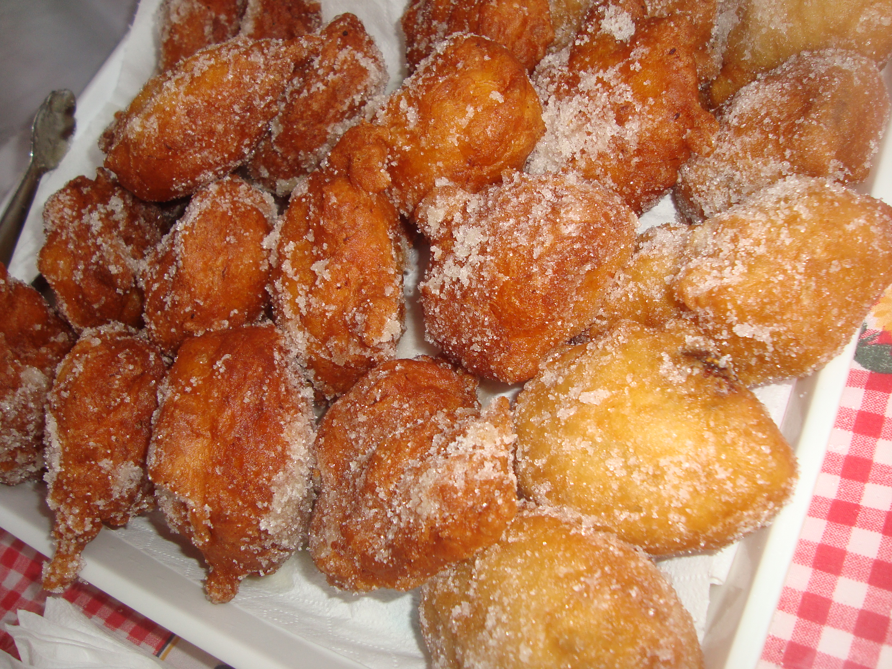 Bunyols i figues albardades